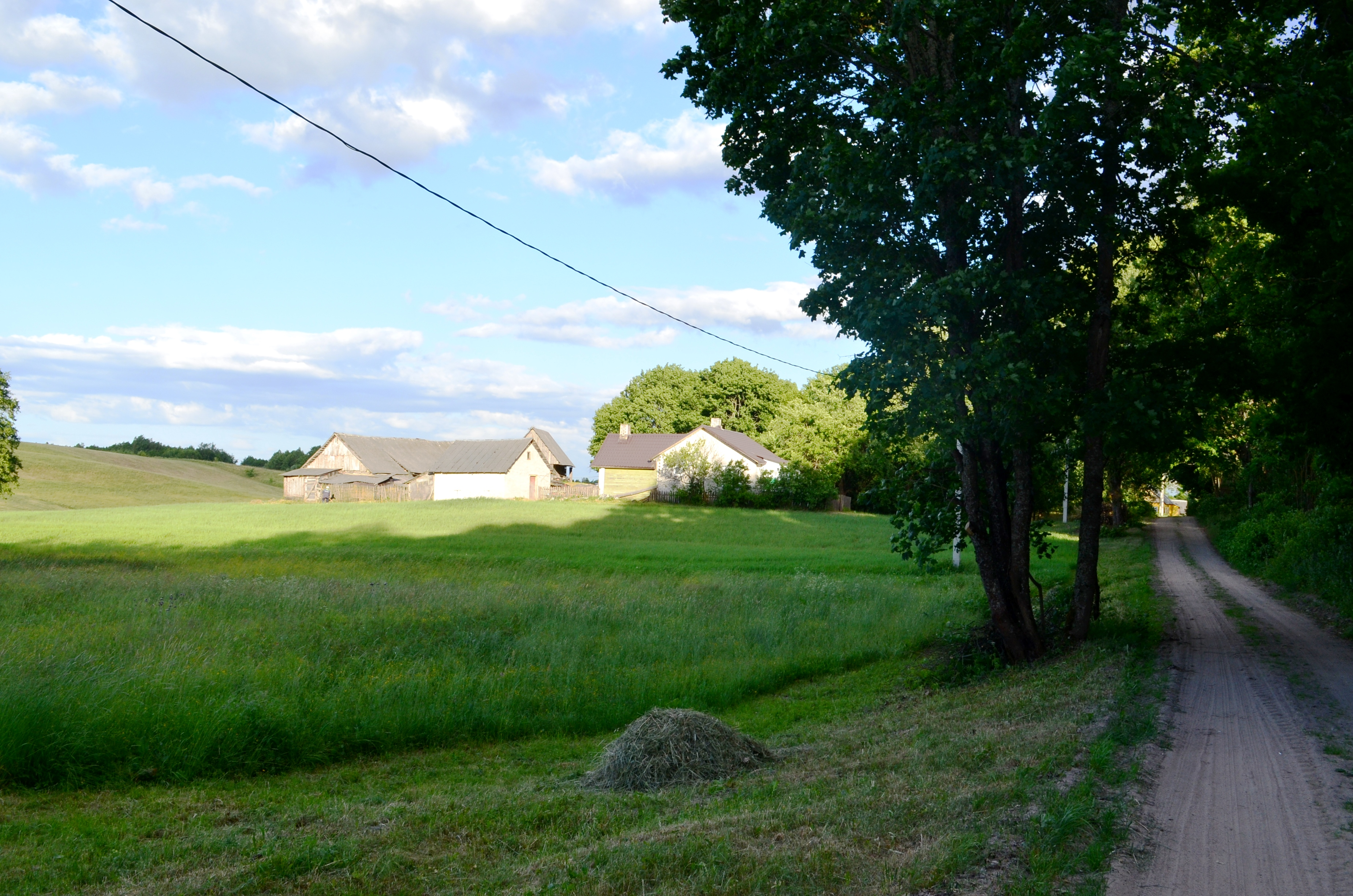 Savulkos, Varėnos raj.